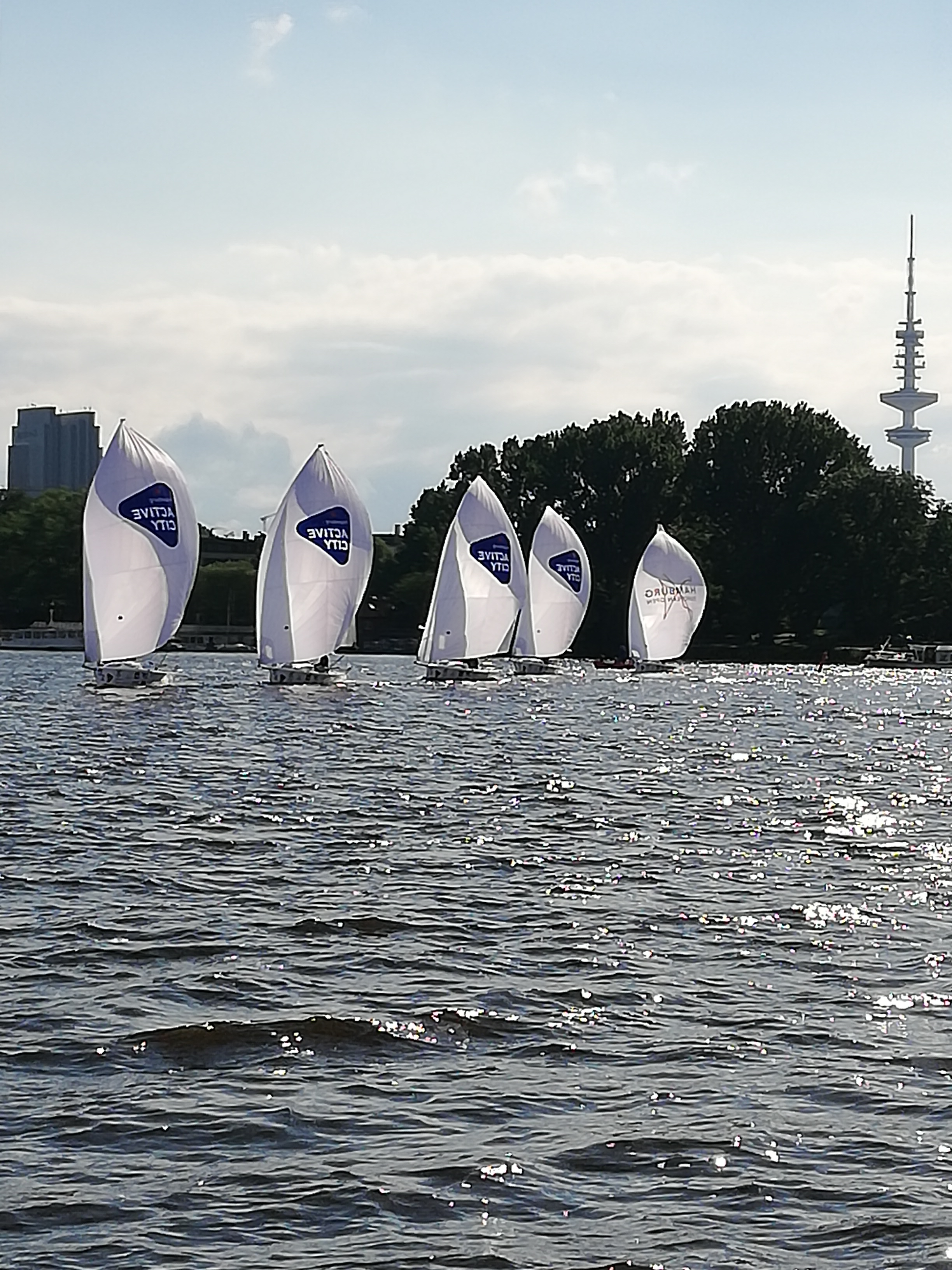 Helga Cup 2019, Bahn: Activ City, Hamburg, Außenalster